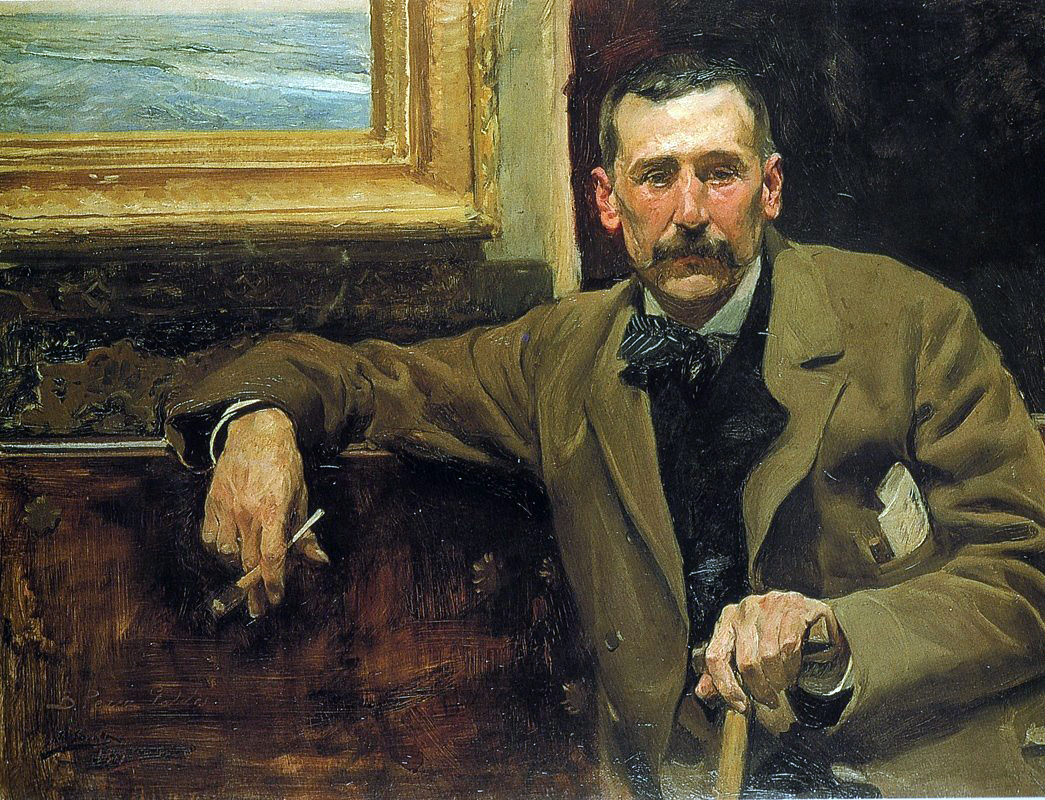 Retrato del escritor español Benito Pérez Galdós (1843-1920).